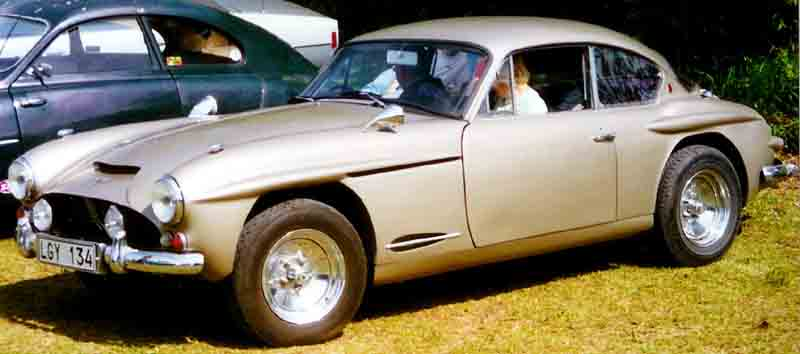 Jensen 541S Coupé 1961